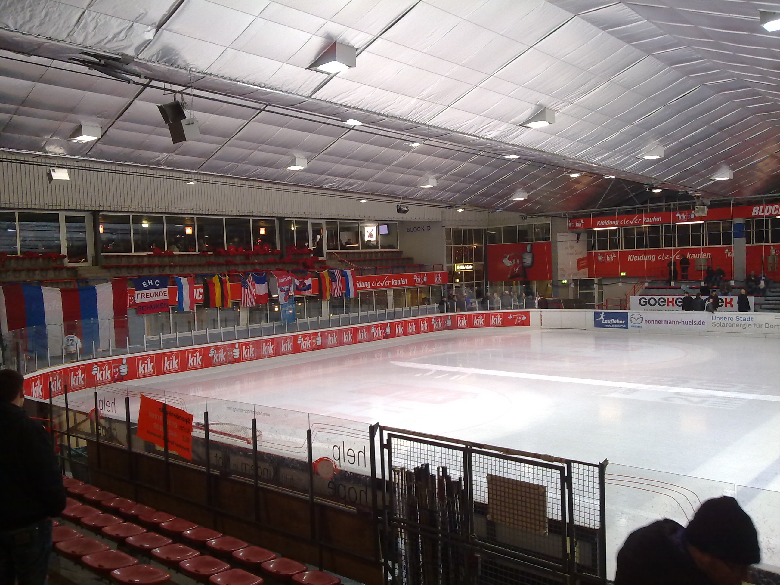 Halle des EHC Dortmund von innen